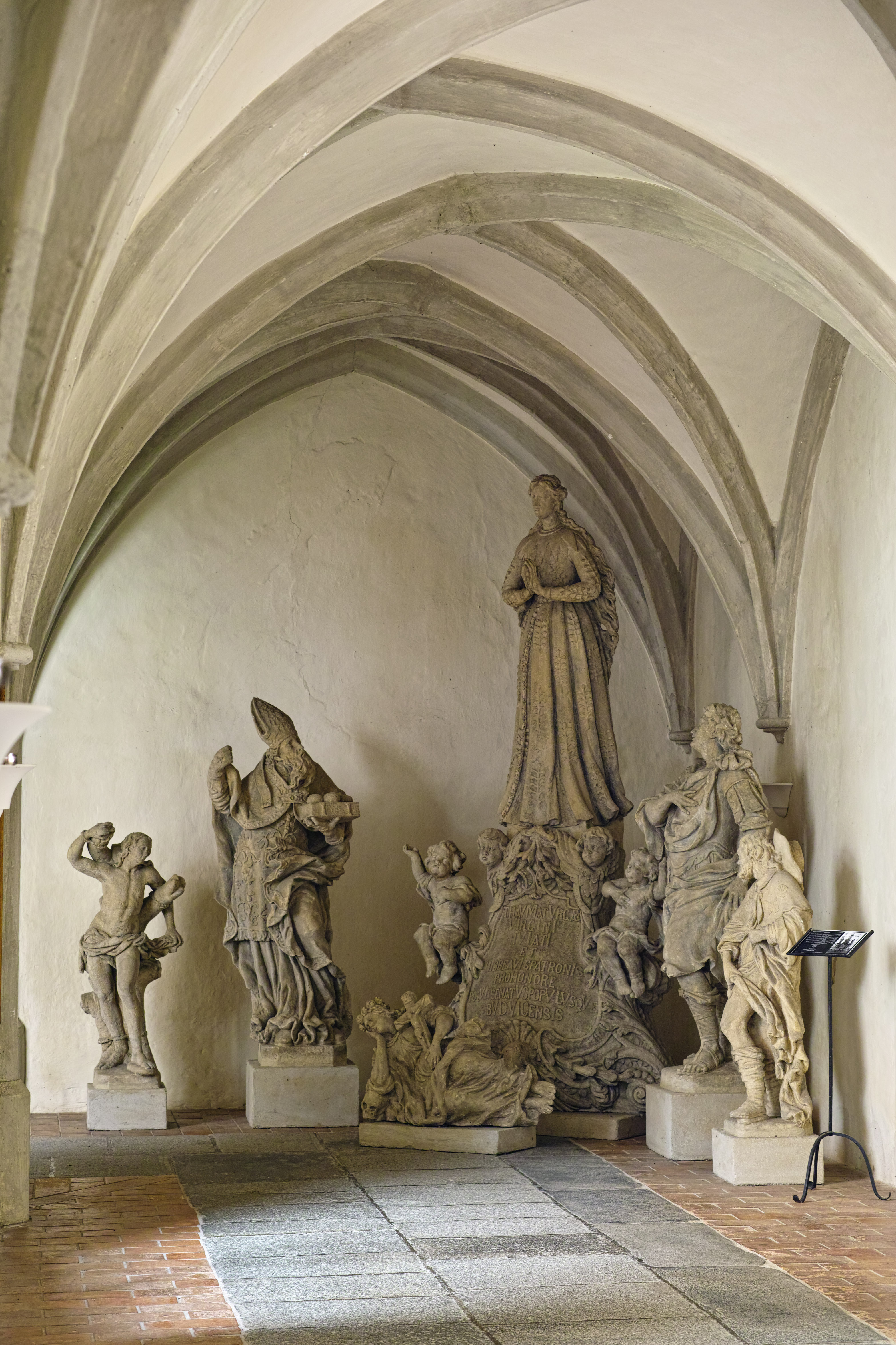 originály soch z Mariánského sousoší od Josefa Dietricha uložené v lapidáru kláštera v Borovanech